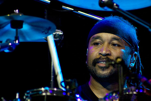 Carter Beauford Dave Matthews Band ao vivo no Vivo Rio, Rio de Janeiro (30/09/2008).